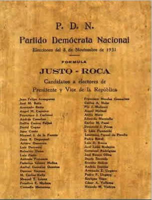 Ballot for presidential election 1931. Boleta elección presidencial 1931. Agustín P. Justo presidente.